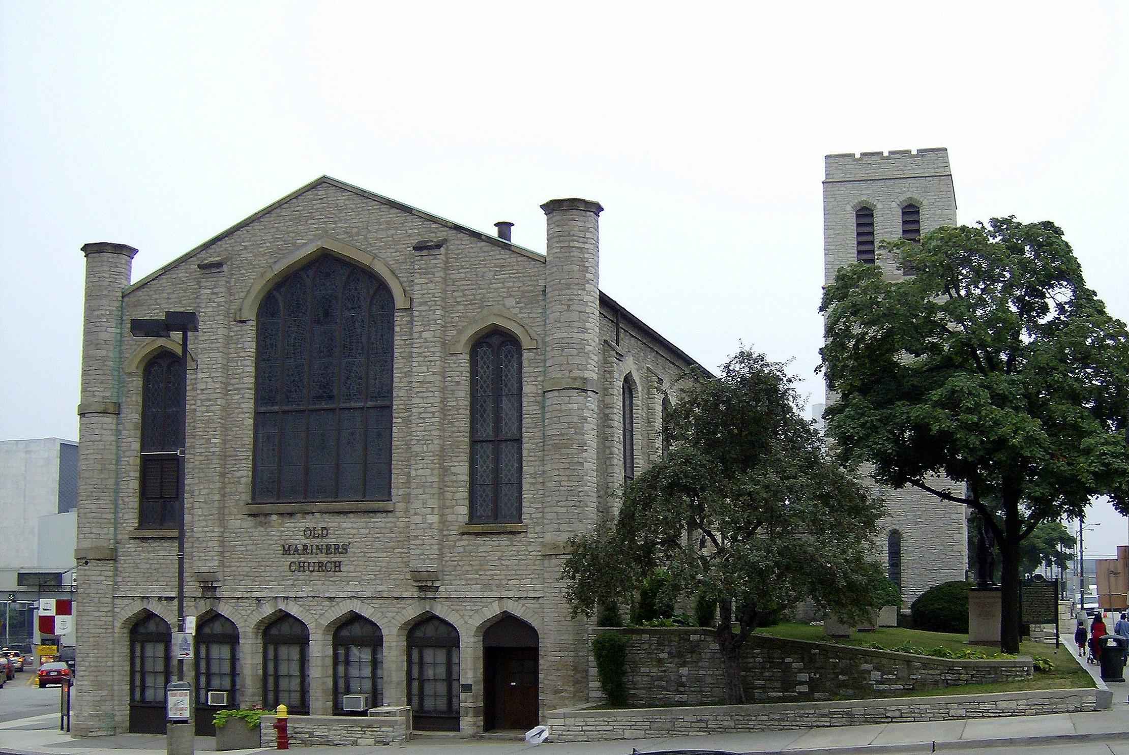 Mariner Church, detroit, MI